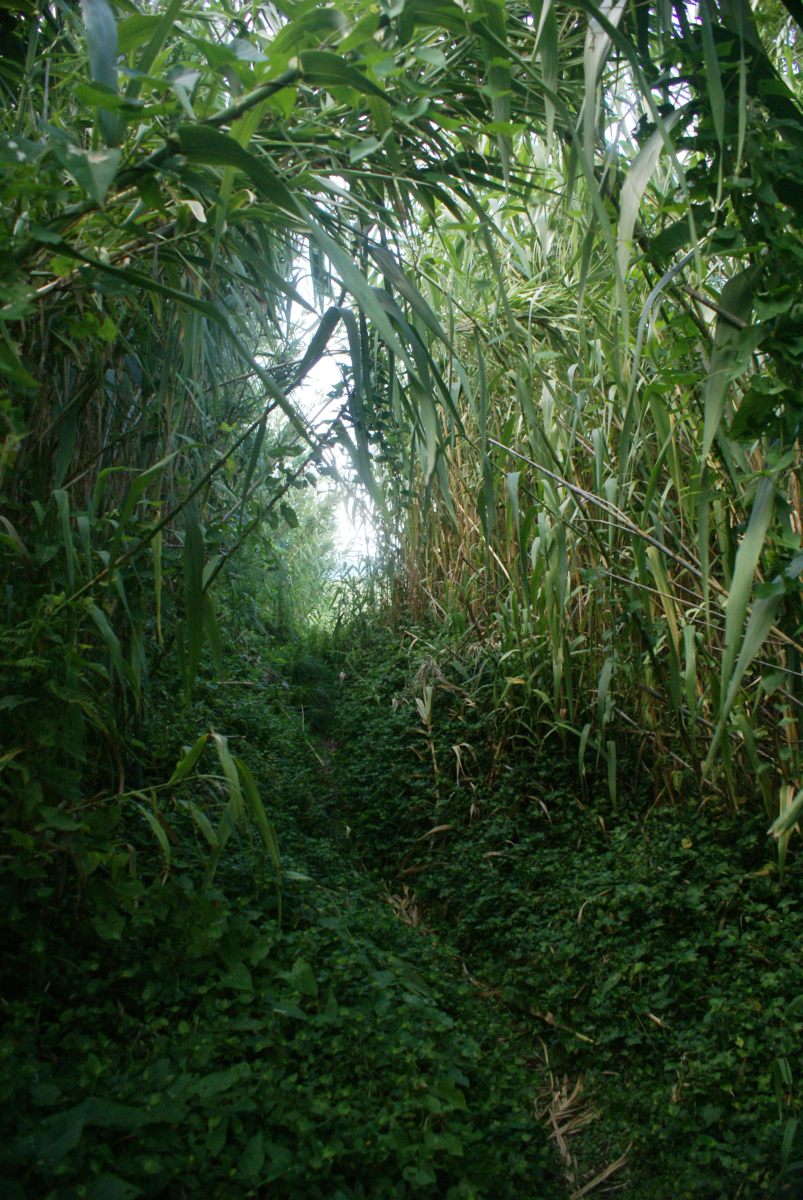 Fajã de Vasco Martins, trilhos por entre a floresta de endémicas da Laurissilva típicas da flor da Macaronésia, Velas, ilhas de São Jorge, Açores